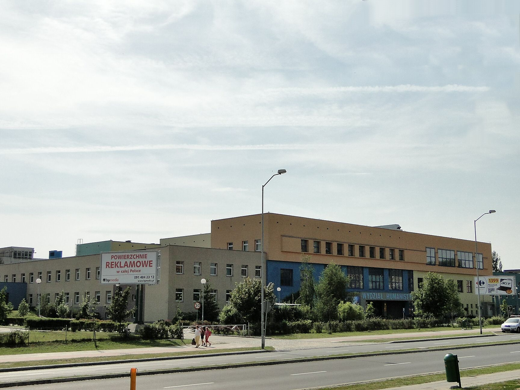 Siedziba Wydziału Humanistycznego Uniwersytetu Szczecińskiego przy ulicy Krakowskiej 71-79 w Szczecinie.